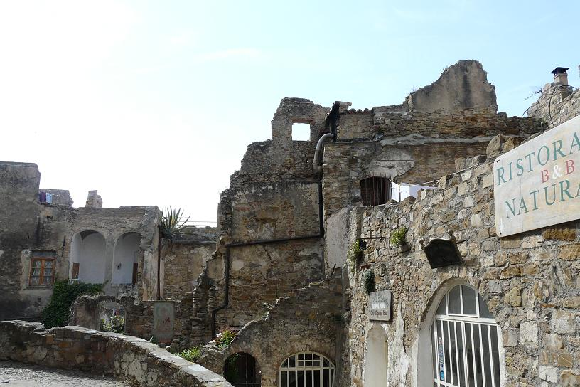 Foto varie di Bussana Vecchia, Sanremo, Liguria, Italia